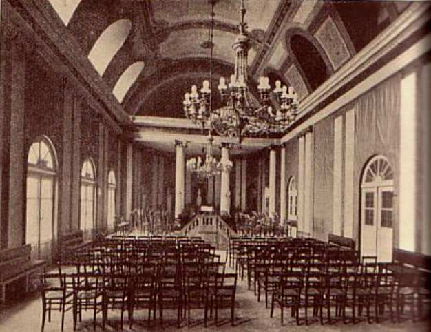 Deutschhaussaal, Fest- Konzert- und Ballsaal erbaut 1812, 1944 zerstört